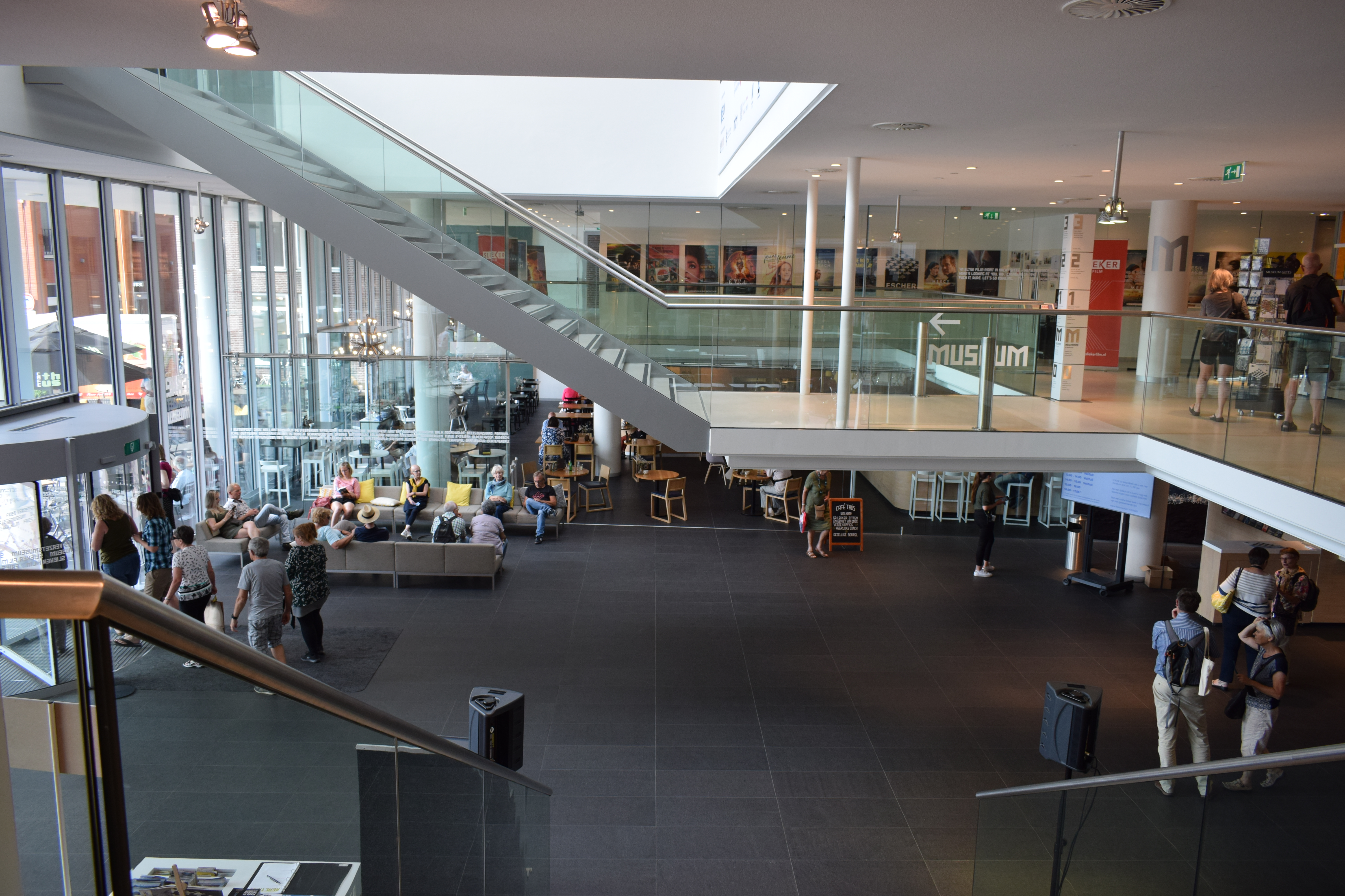 Vue de Leeuwarden en Frise (Pays-Bas).